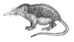 Solenodon cubanus (Atopogale cubana), Almik kubański, Cuban Solenodon